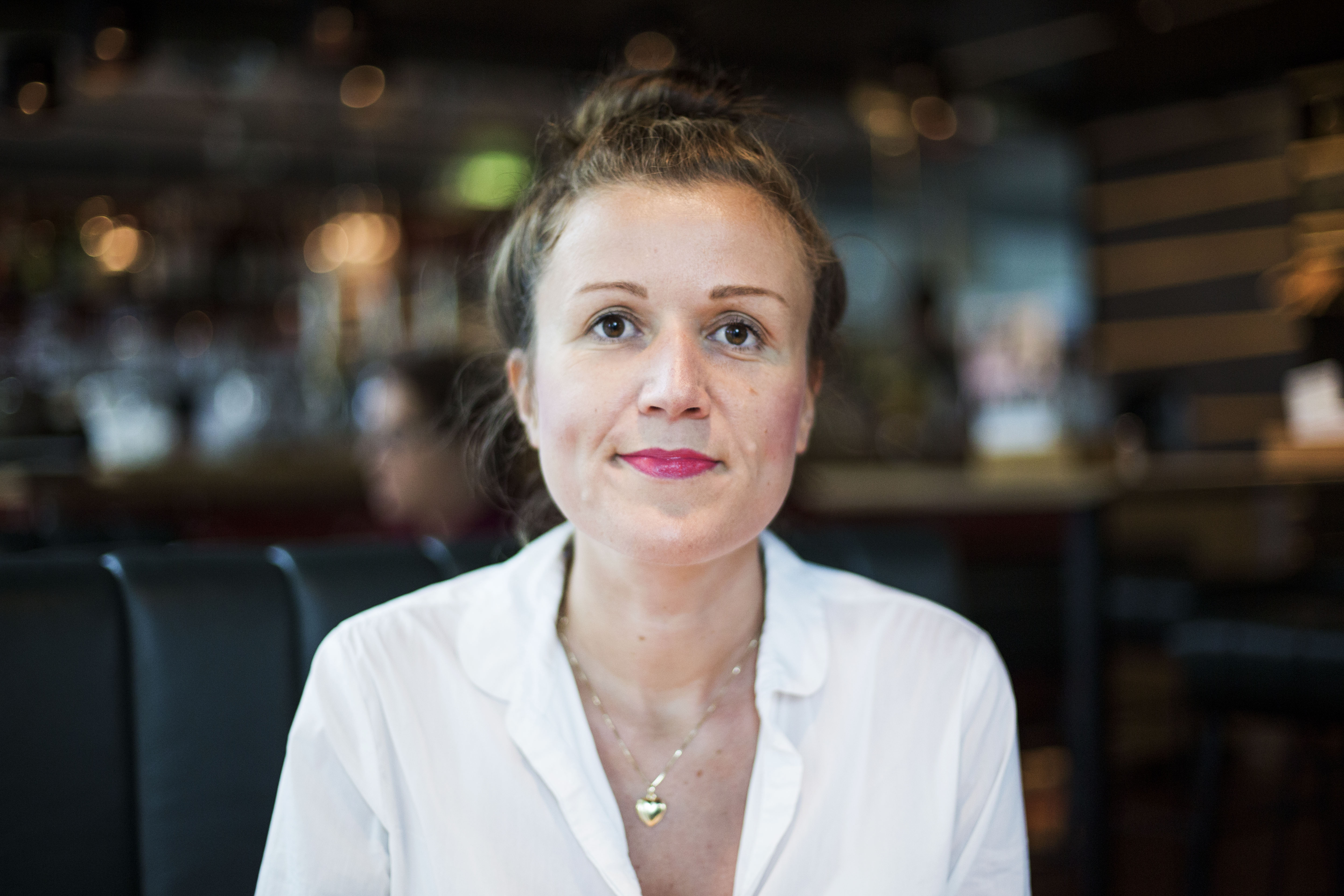 Portrait Daniela Emminger 2018Depicted person: Daniela Emminger – Austrian writer